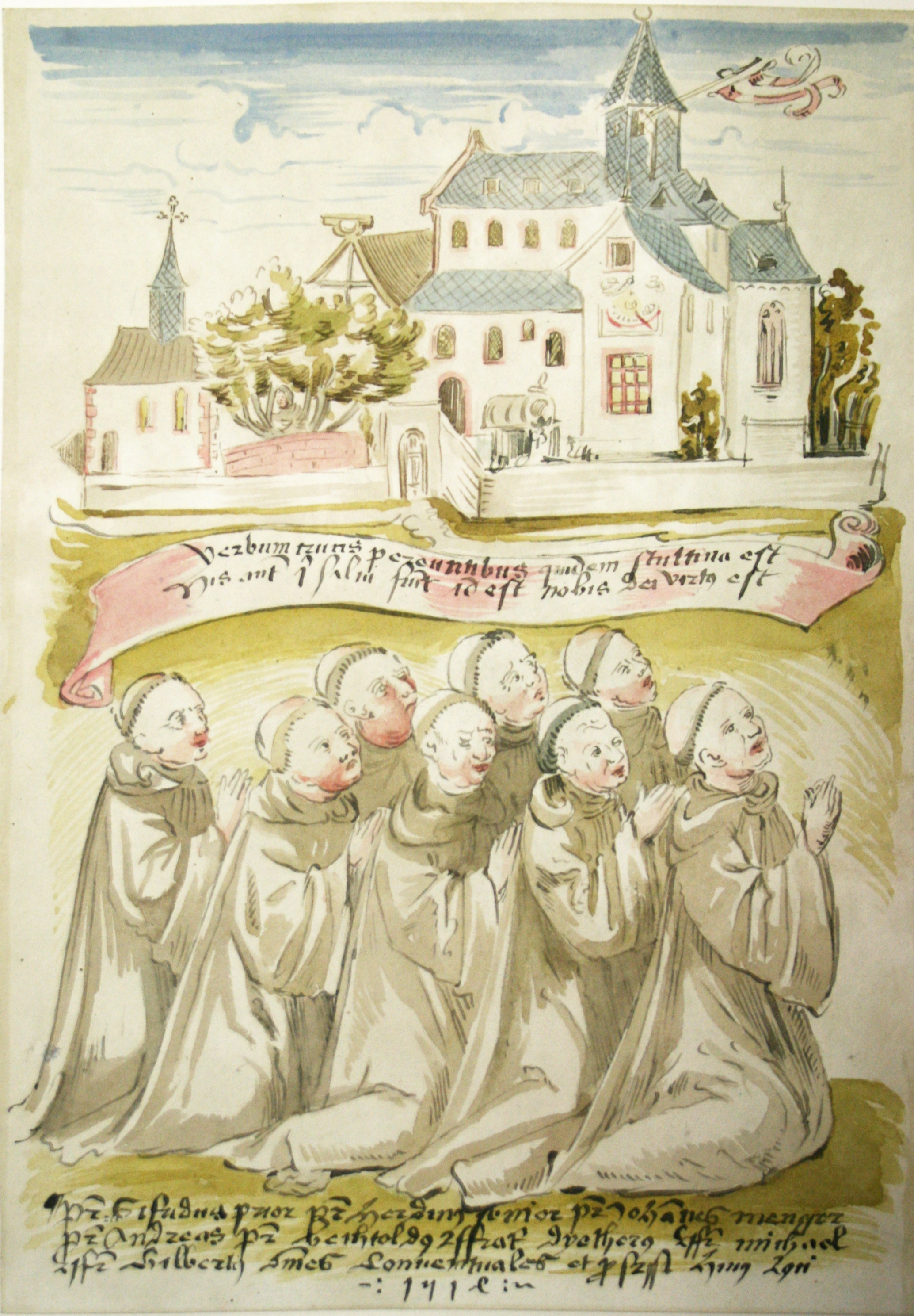 Illustration aus dem Salbuch des Klosters Naumburg: Oben Darstellung der Klostergebäude, darunter kniend die namentlich genannten acht Mönche.